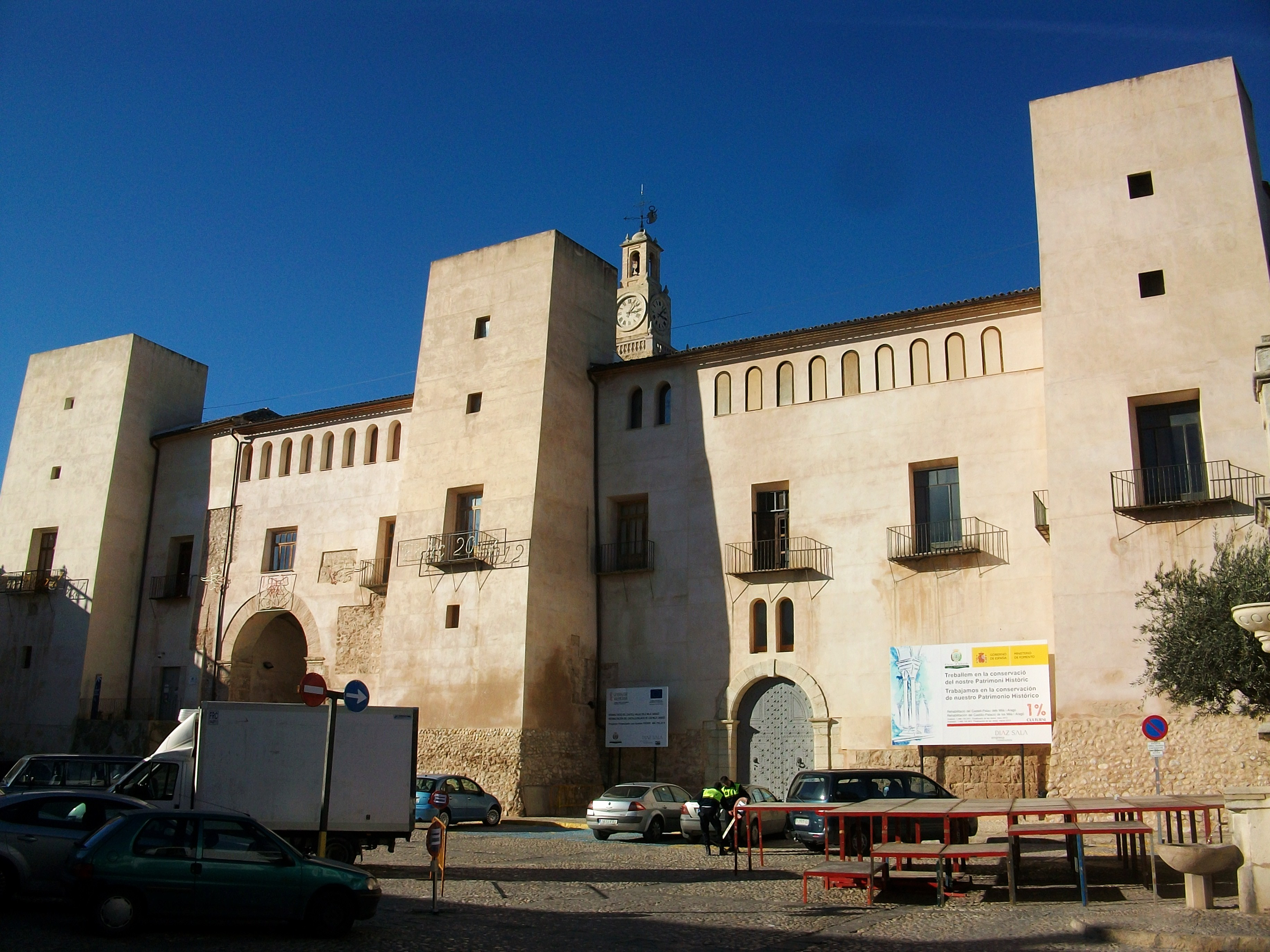 Palau dels Milà i Aragó d'Albaida, País Valencià.